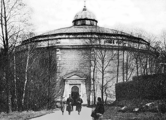 Lwów, Panorama Racławicka, park im. Jana Kilińskiego we Lwowie, po 1894